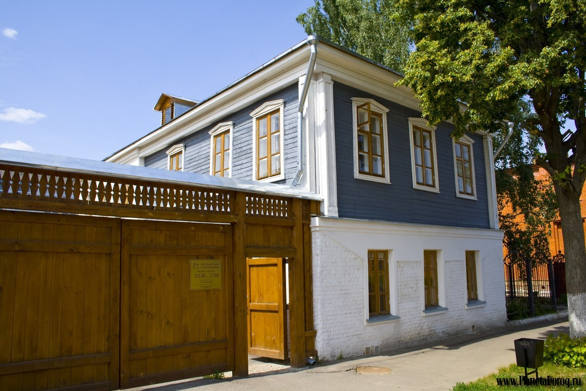 Дом-музей скульптора А.С.Голубкиной в городе Зарайске. Фото из частного архива Кутаева Владимира Степановича